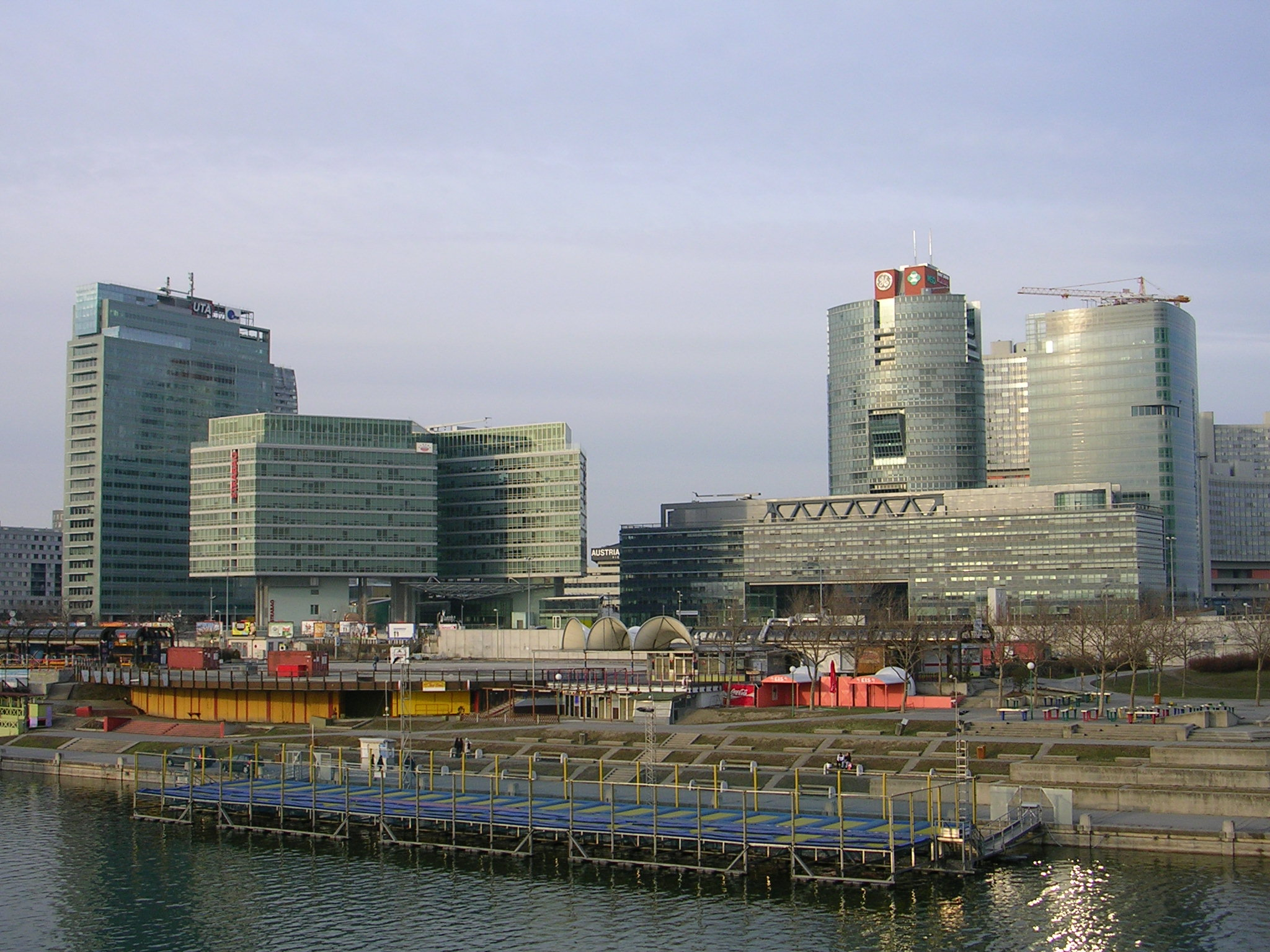 Donau City from Reichsbrücke